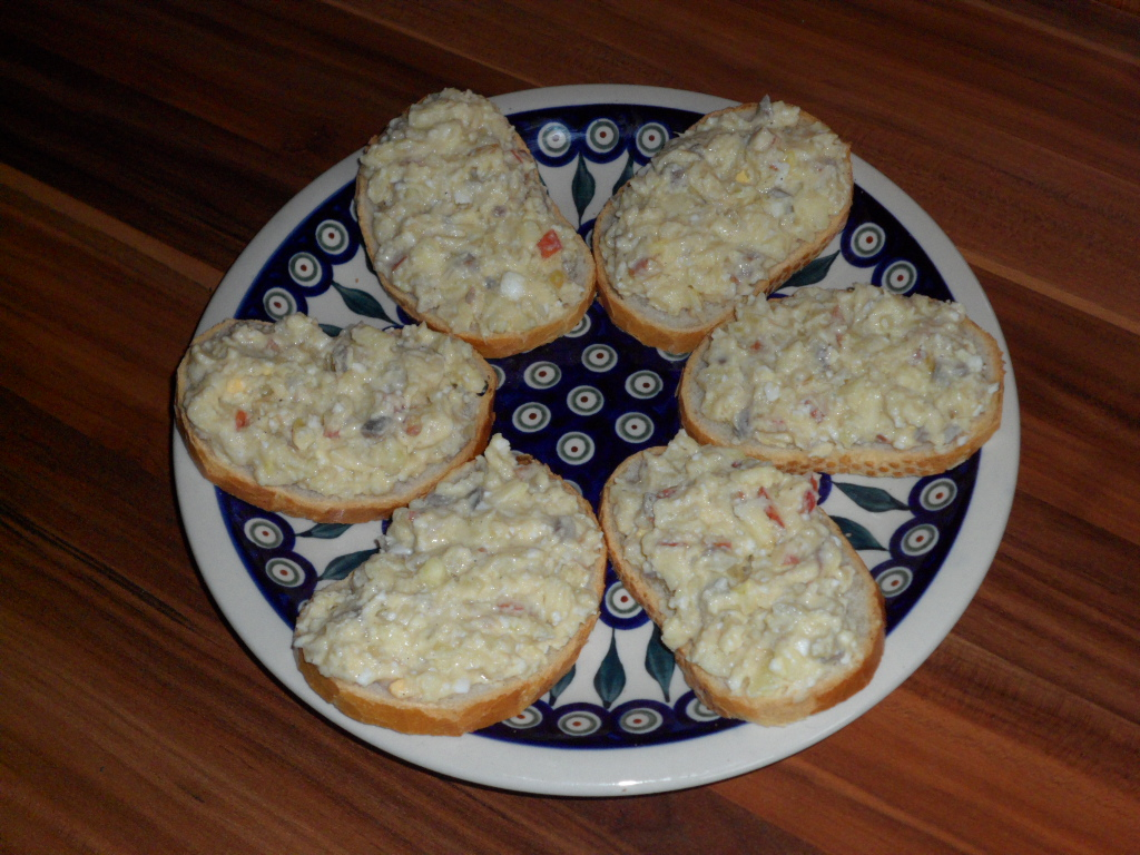 Schlesische Häckerle